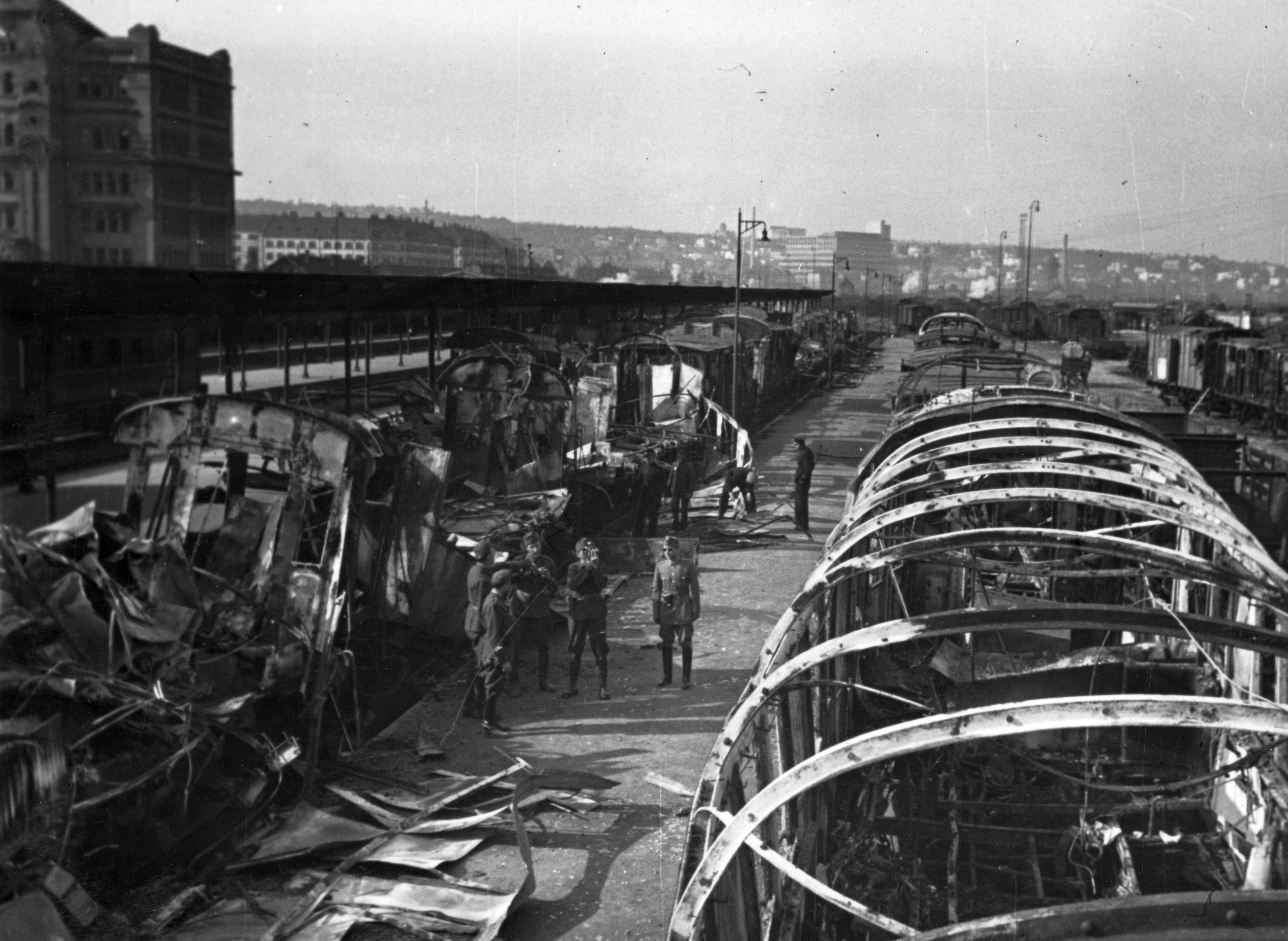 Központi pályaudvar romjai 1941 után, háttérben balra a megrongálódott postapalota . Location: Serbia, Belgrade Tags: railway, wreck, second World War Title: Központi pályaudvar romjai 1941 után, háttérben balra a megrongálódott postapalota .